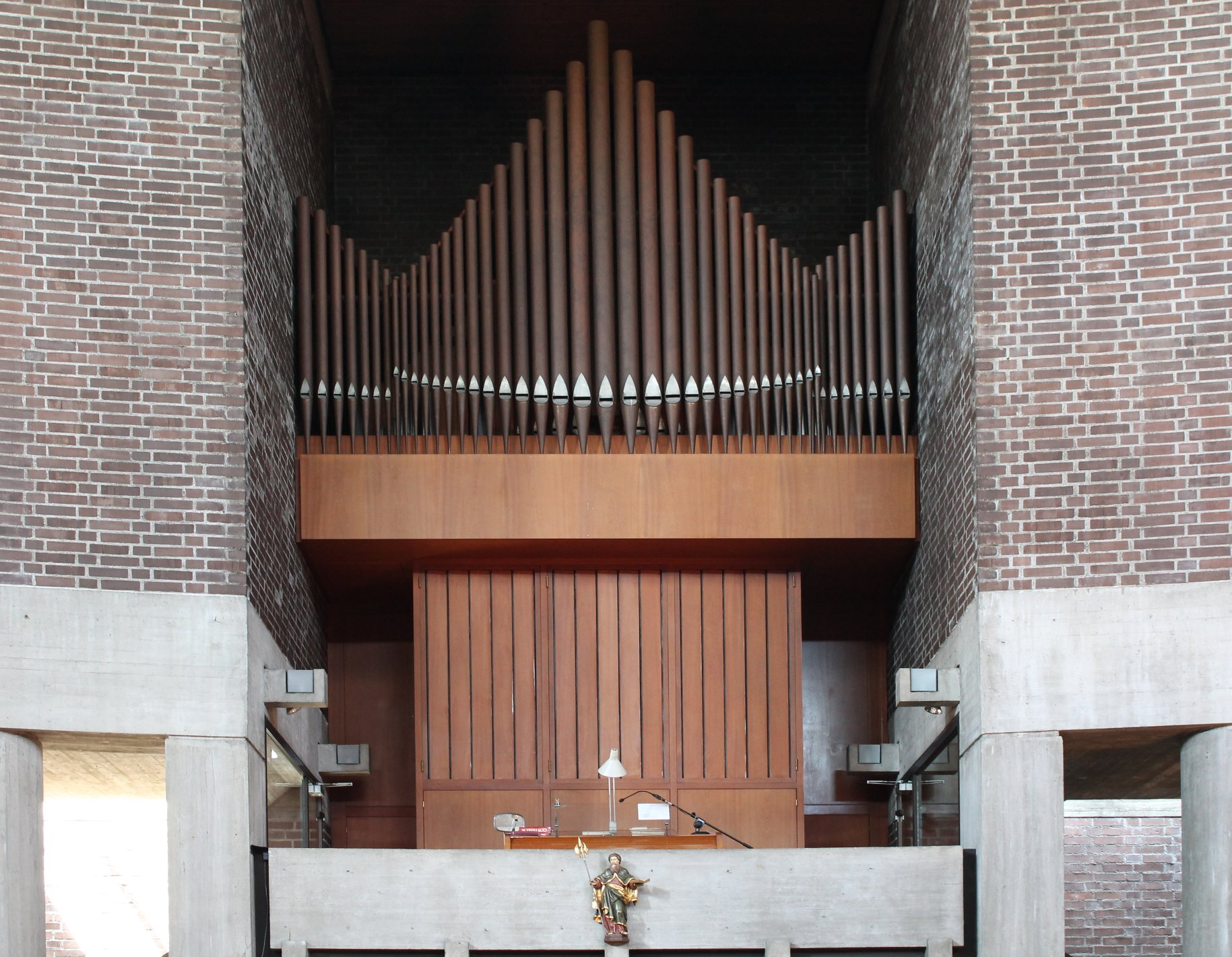 Orgel von St. Matthias in München-Fürstenried (1974, W. Stöberl, II/22)